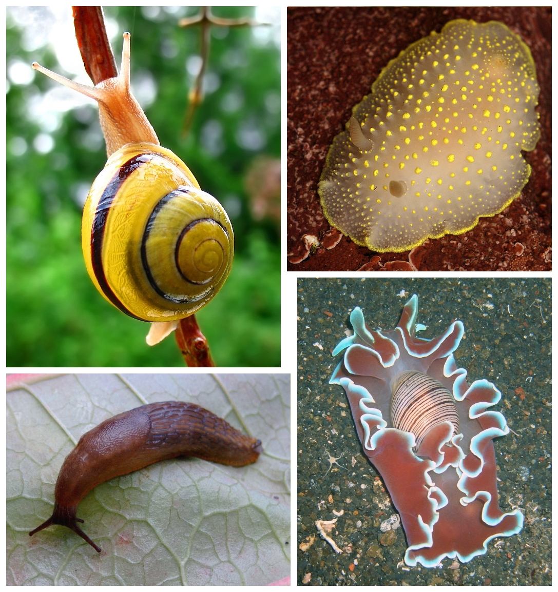 Heterobranchia composite image.